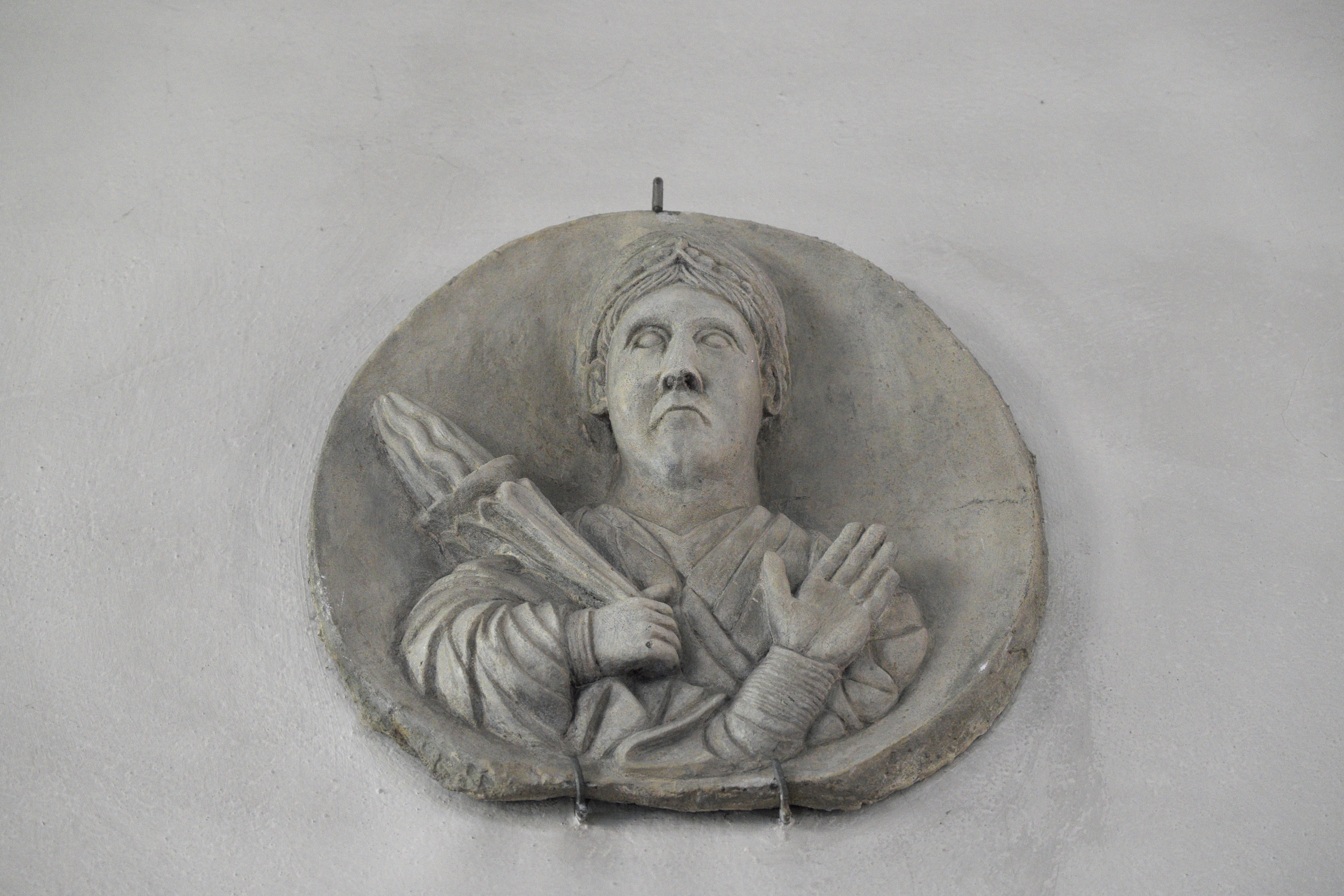 Evangelisch-lutherische Pfarrkirche, ehemals St. Veit, in Solnhofen im Landkreis Weißenburg-Gunzenhausen (Bayern), Kopie des Sola-Medaillons, Darstellung: Kaiser Ludwig der Fromme (?)